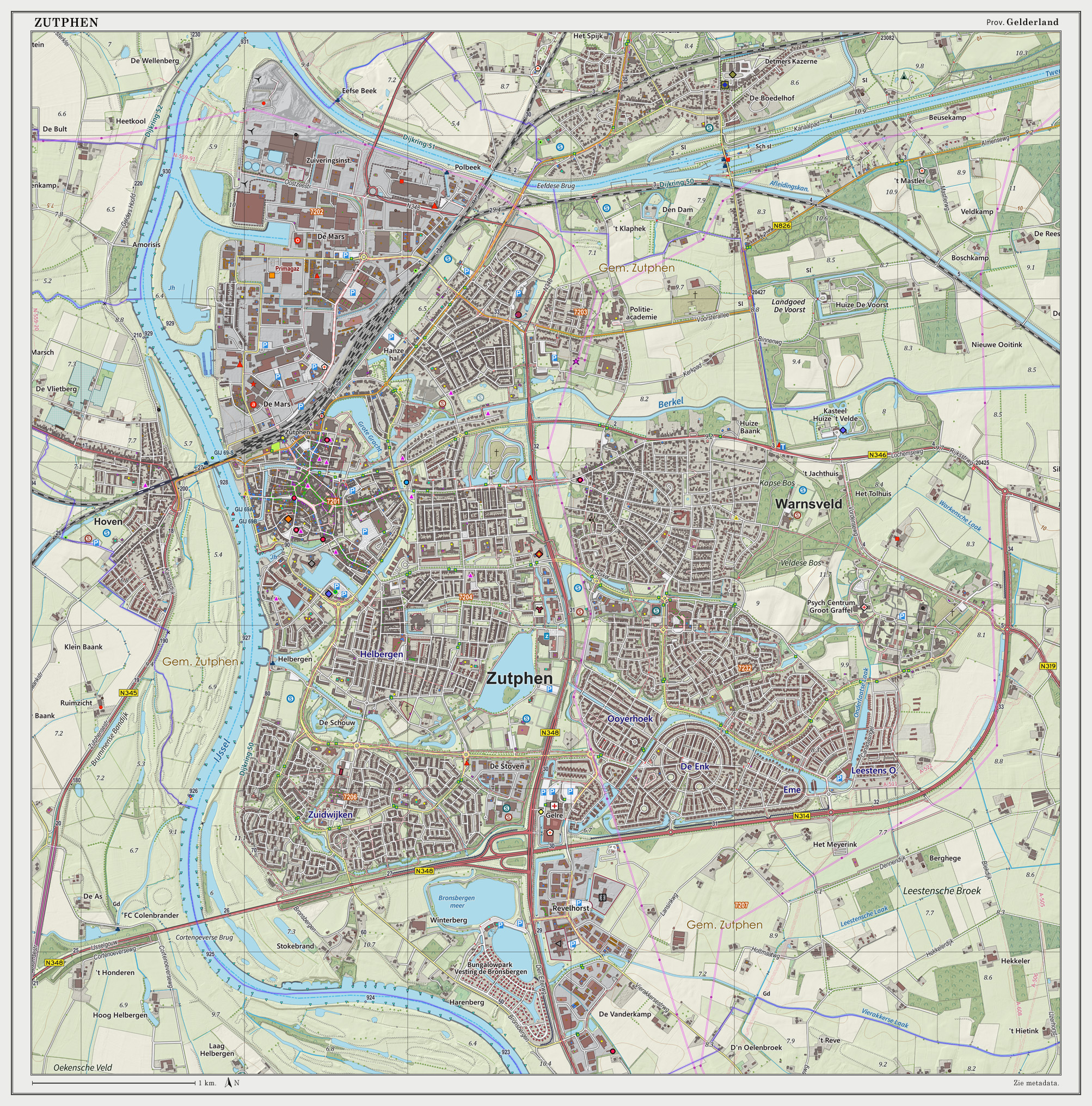 Topografische kaart van Zutphen (woonplaats). Resolutie: 300 pixels/km. Kaartbeeld samengesteld uit de open geodata van de Top10NL en Top25namen (Basisregistratie Topografie, Kadaster), Creative Commons BY licentie. Gebouwvlakken uit open geodata BAG extract. Wegen uit de OpenStreetMap. Reliëfschaduw uit de Actuele Hoogtekaart AHN2. Samenstelling en kleurenschema: Jan-Willem van Aalst, met QGIS2. Zie ook de Legenda.